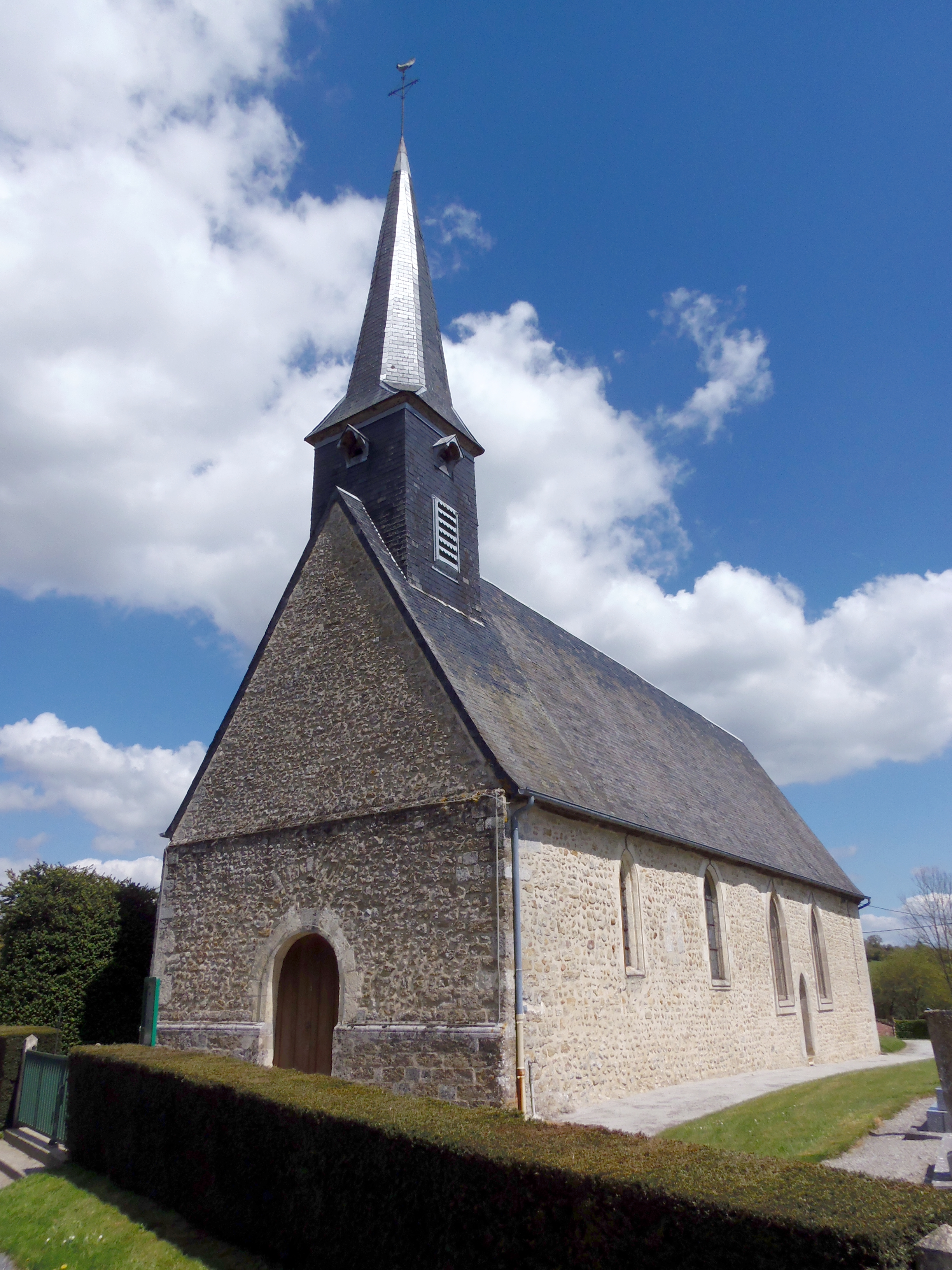 Le Chalange (Normandie, France). L'église Saint-Jean-Baptiste.